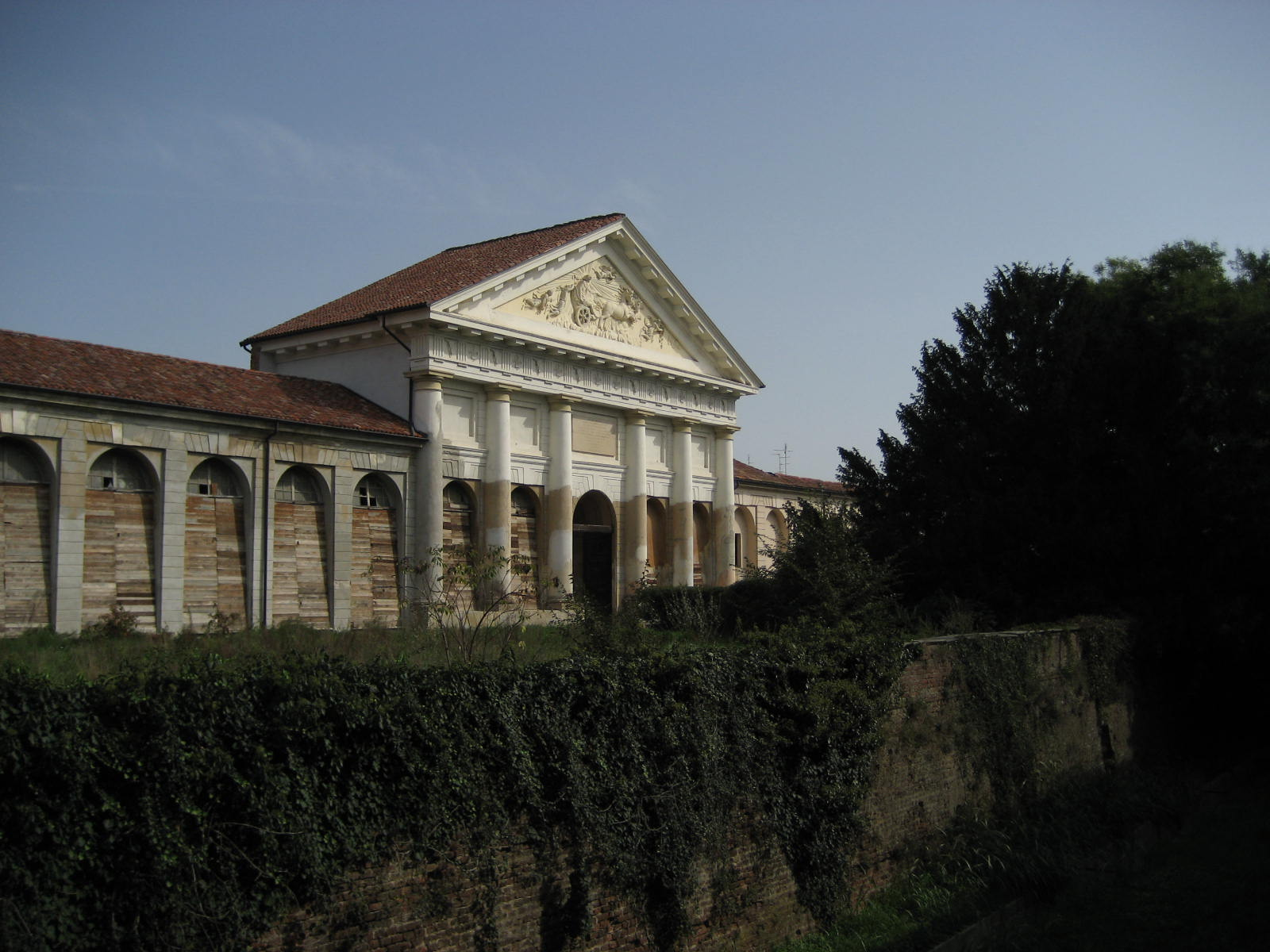 Le serre e le scuderie progettate nel 1792 dall'architetto Leopold Pollack di fianco al castello di Belgioioso.